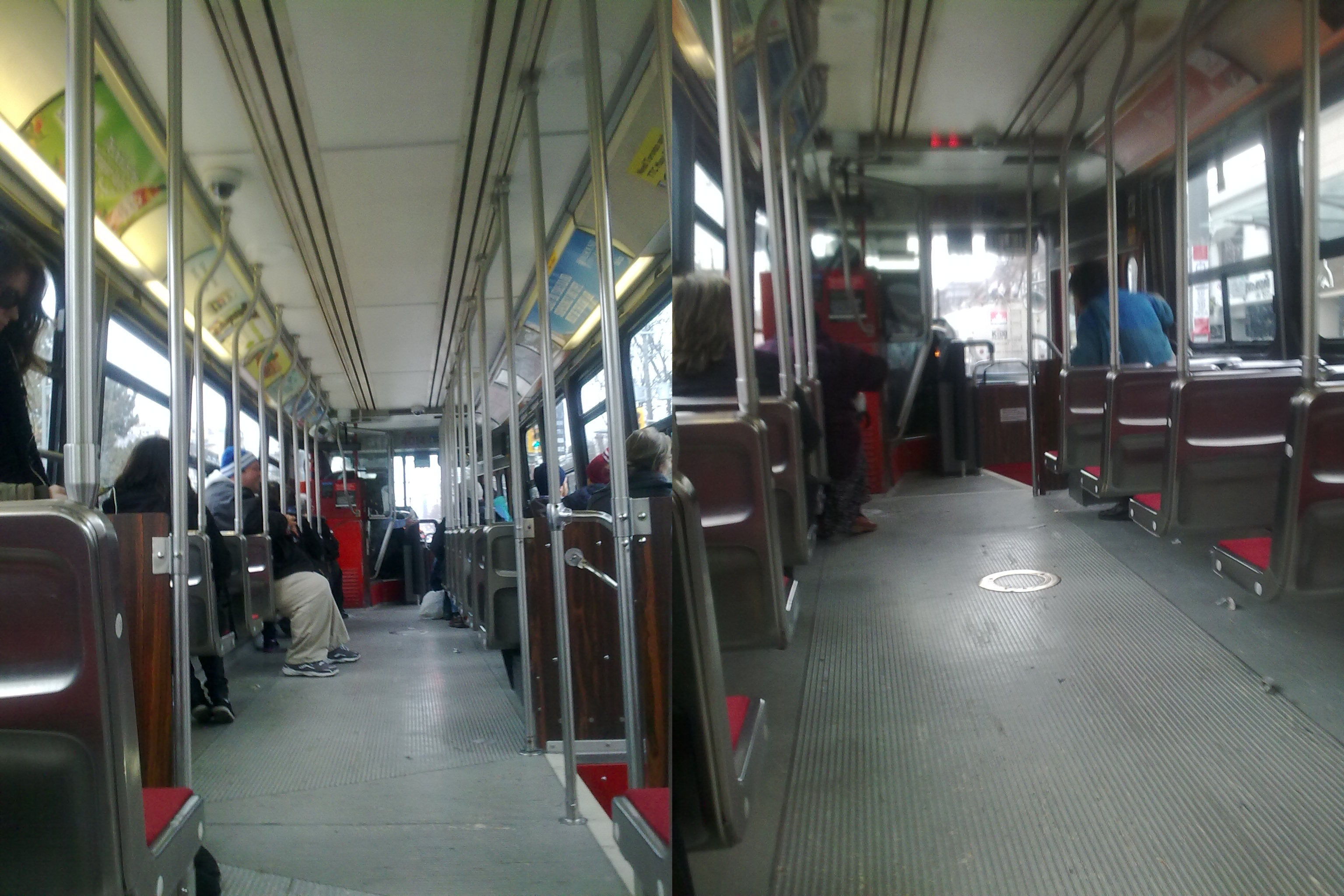 Junção das imagens File:Interiorbondetoronto.jpg e File:Torontointeriorbonde.jpg .